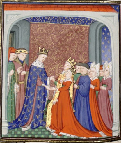 Filip VI. a skotský král David Bruce